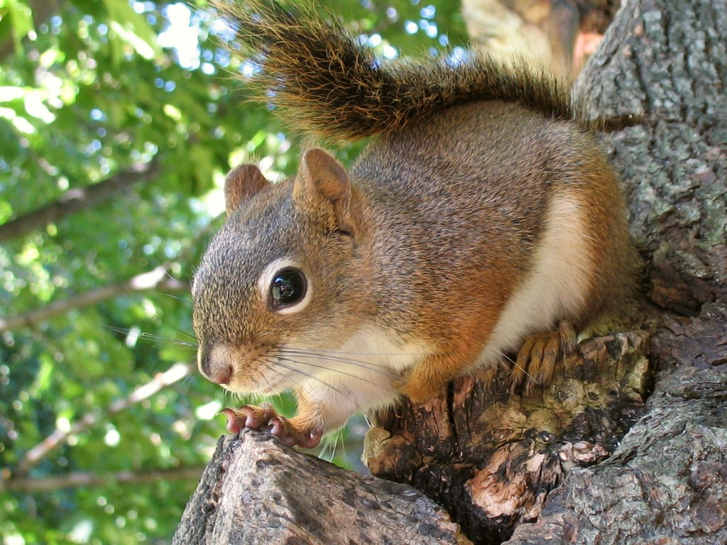 Tamiasciurus hudsonicus Écureuil roux nord-américain -- North American Red Squirrel Bas-Saint-Laurent -- Province de Québec -- Canada Prise en septembre 2007 -- Taken in September 2007